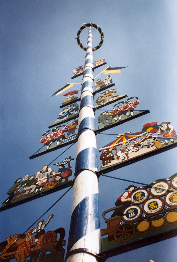 Bild des Maibaums auf dem Viktualienmarkt in München